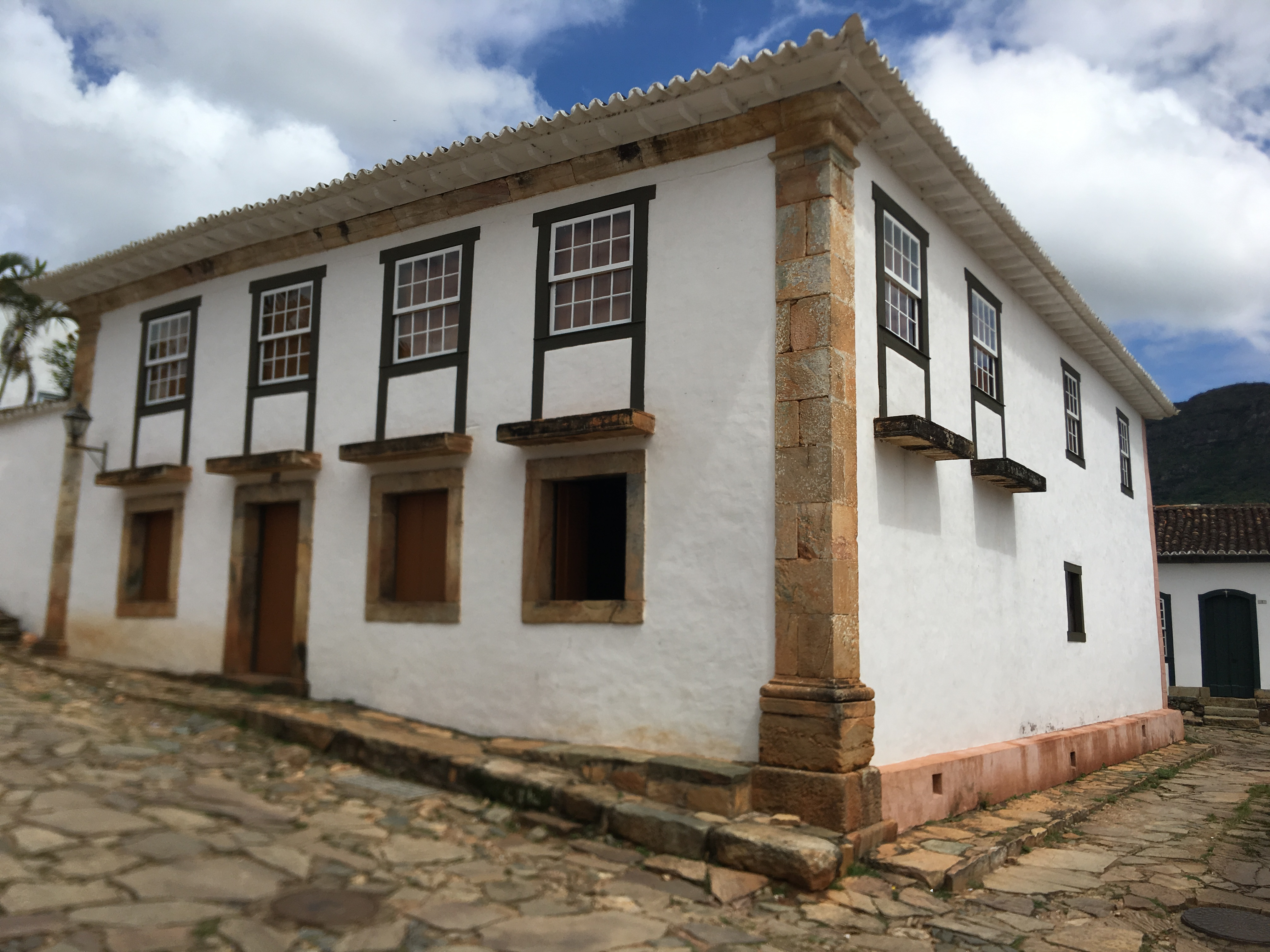 Sobrado Ramalho da cidade de Tiradentes (MG), sede do IPHAN, do IHGT e da SOBR